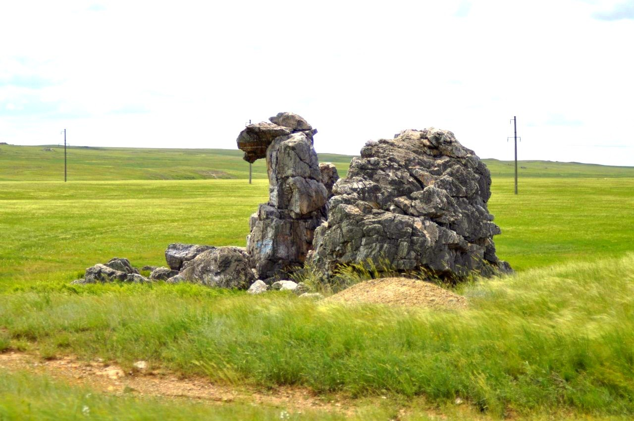 Скала Верблюд: Светлинский район, Оренбургская область This image is related to the protected area of Russia number 5610064